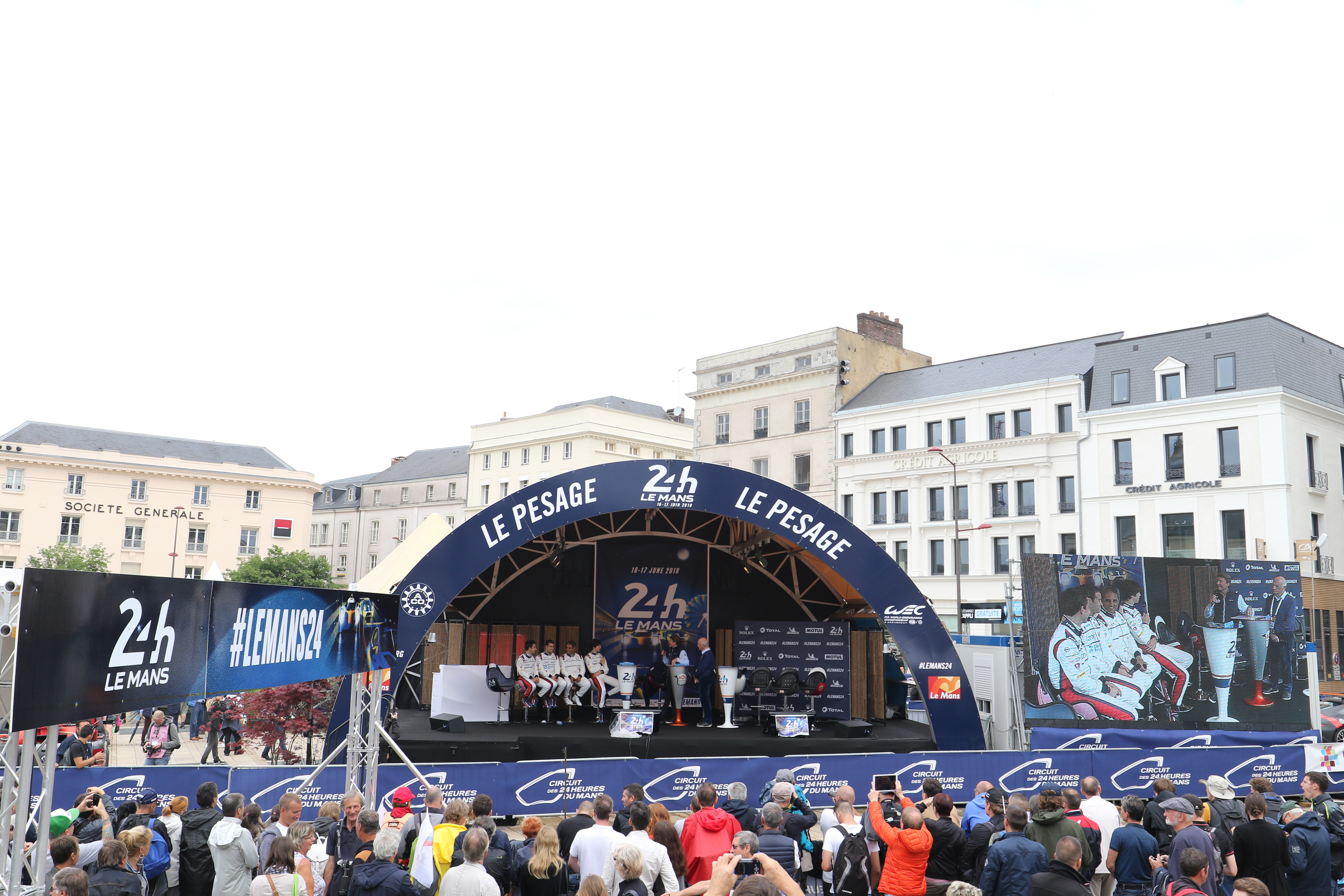 United Autosport lors des 24 Heures du Mans 2018.